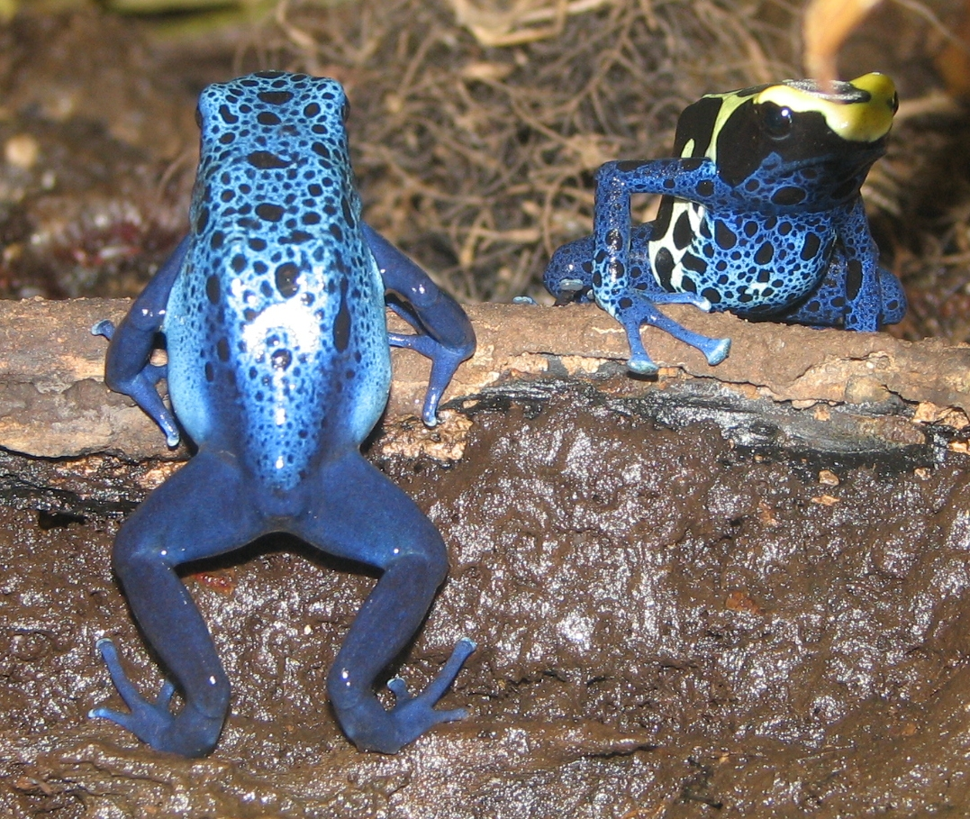 Poison Dart Frogs (Dendrobates azureus) and (Dendrobates tinctorius)